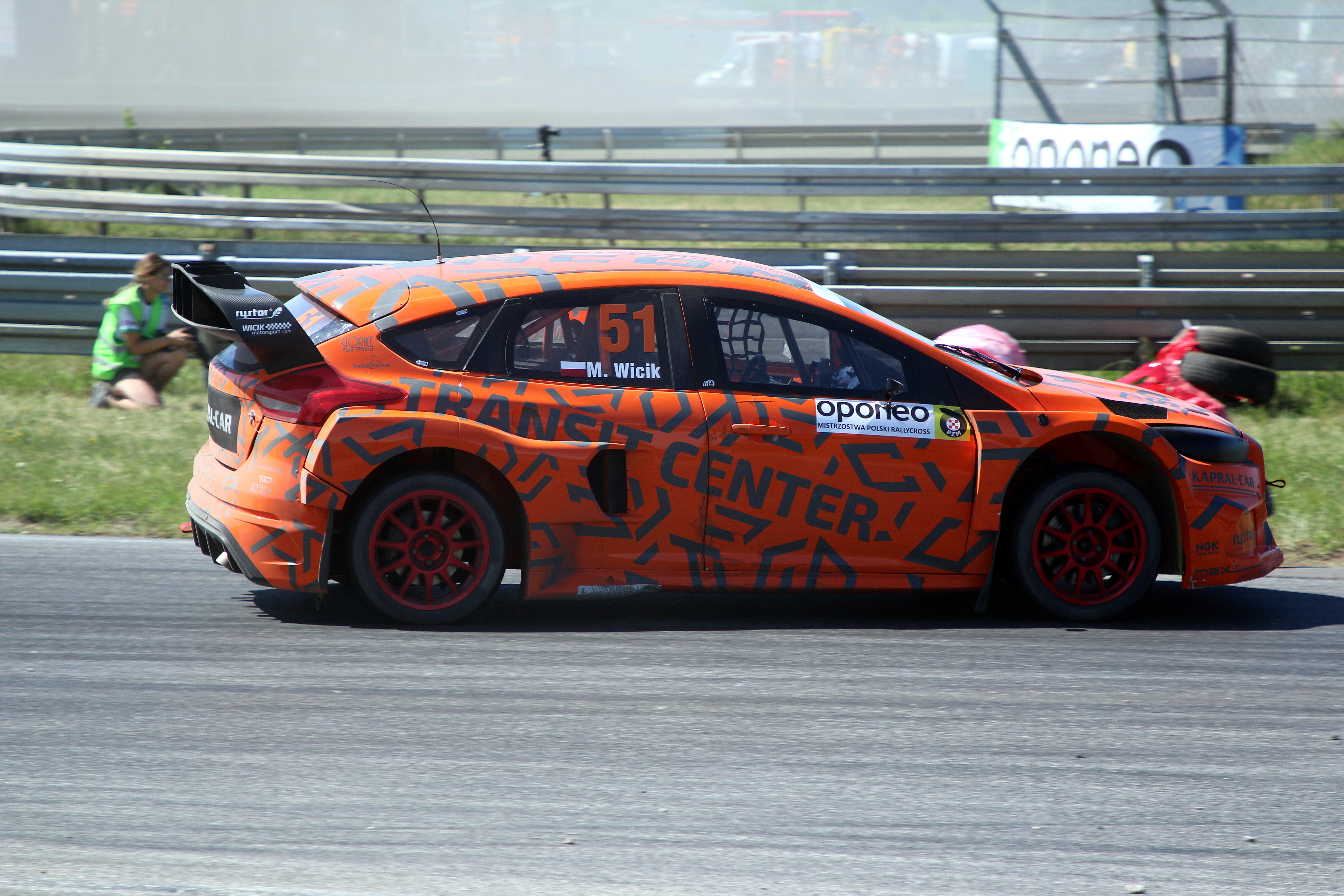 4 Runda OPONEO Mistrzostw Polski Rallycross, Toruń, Marcin Wicik